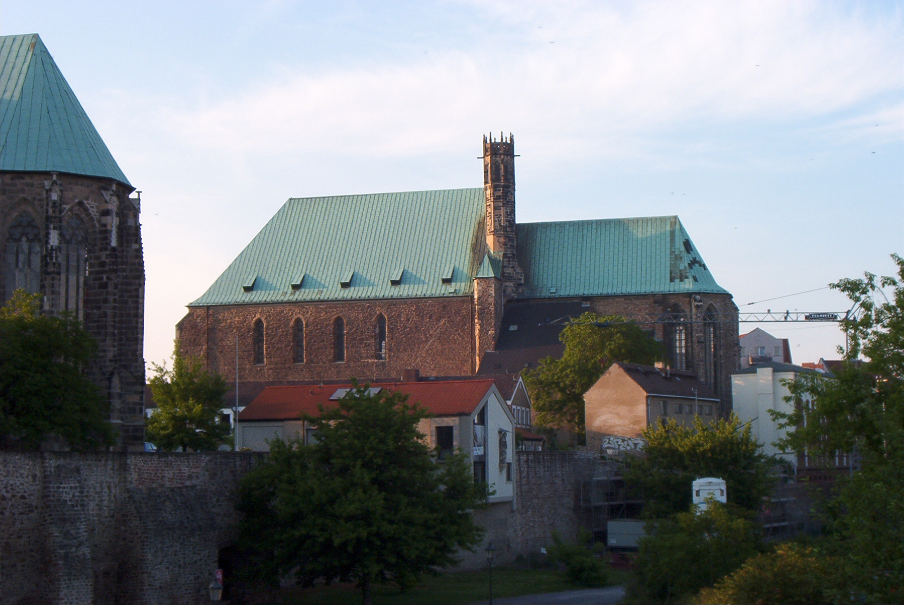 Südseite der Wallonerkirche in Magdeburg